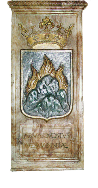 Västman landskaps vapen vid Gustav vasas grav